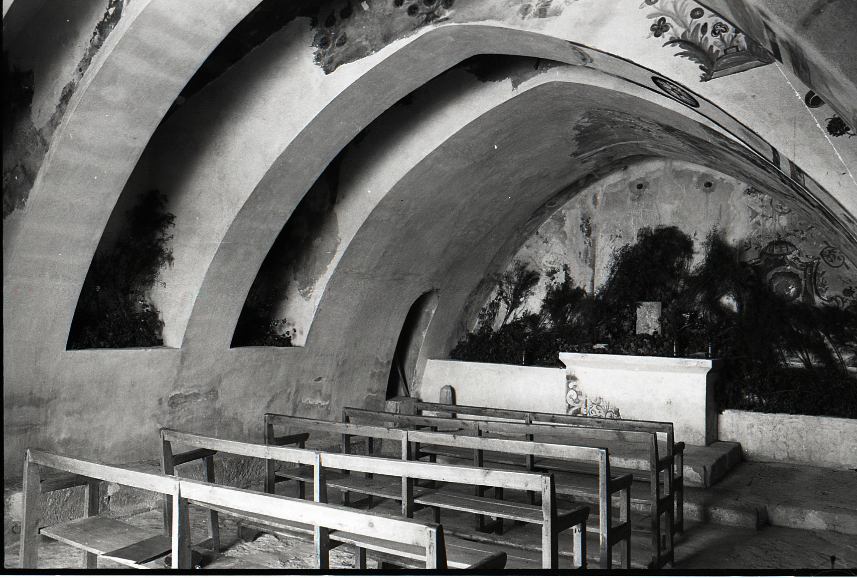 Interior de l'església de Sant Joan d'Algars (Terra Alta, Tarragona), segle XIII.